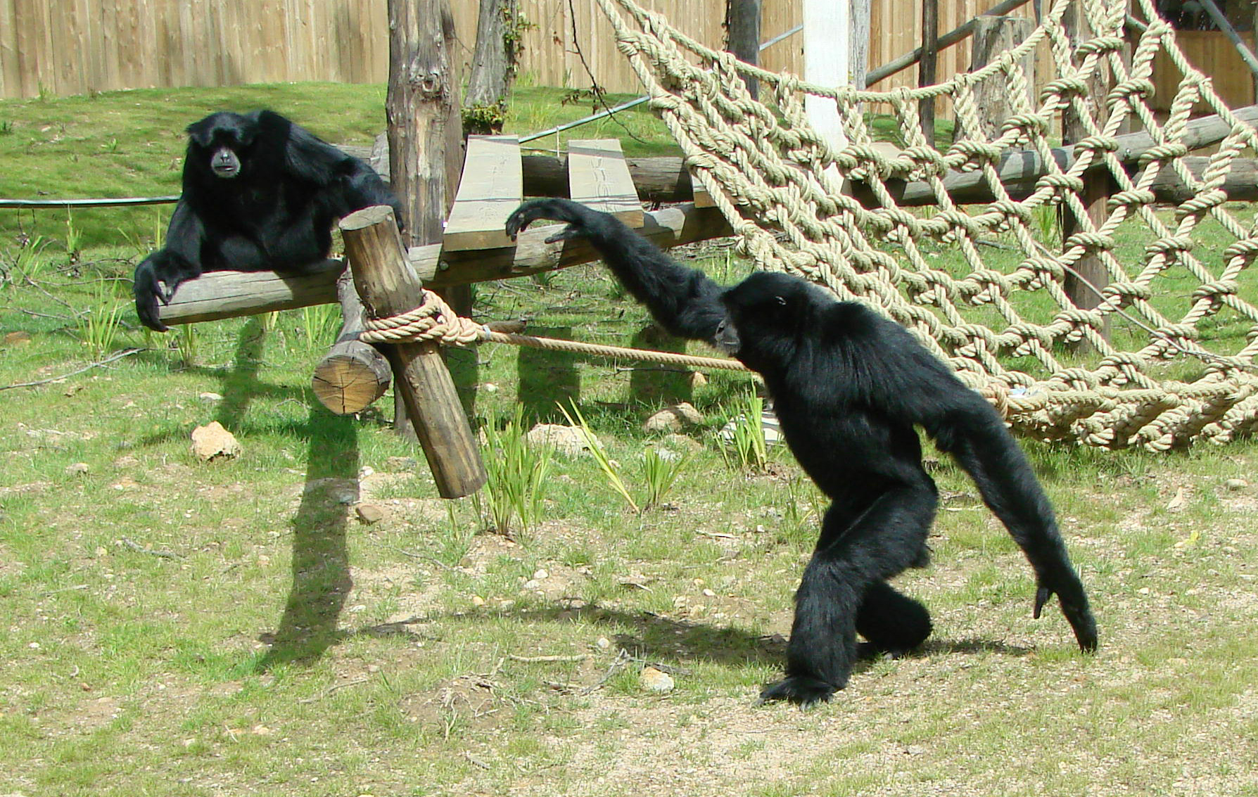 Siamangs (Hylobates syndactylus /symphalangus syndactylus), zoo d'Amnéville.